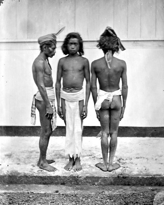 Repronegatif. Foto etnografis tiga orang Alifuru (?) dari Pulau Ternate.